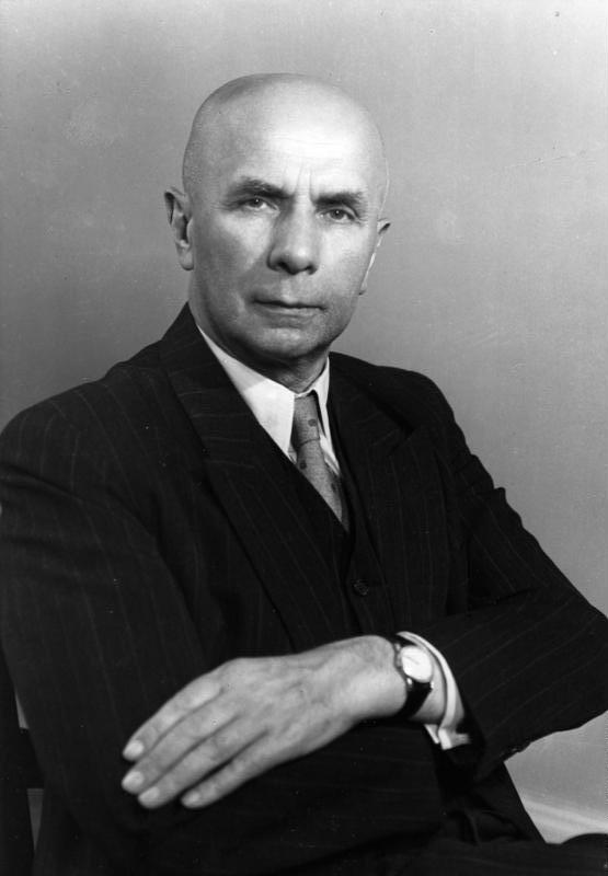 Jakob Kaiser, Bundesminister für gesamtdeutsche Fragen, 1949-1957 Foto Bundesbildstelle Bonn